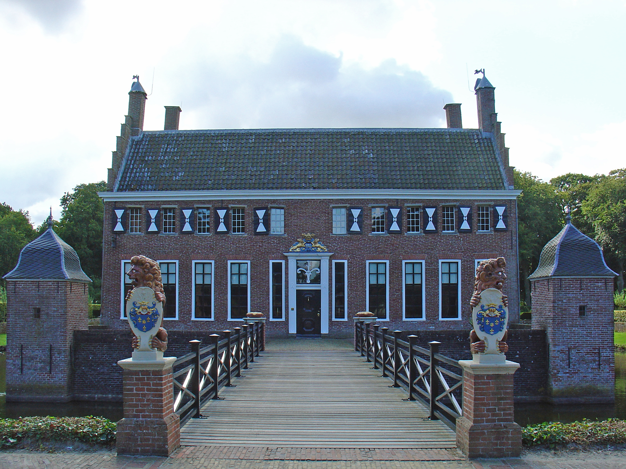 Menkemaborg in Uithuizen